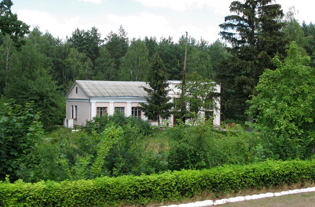 Пасажирська будівля